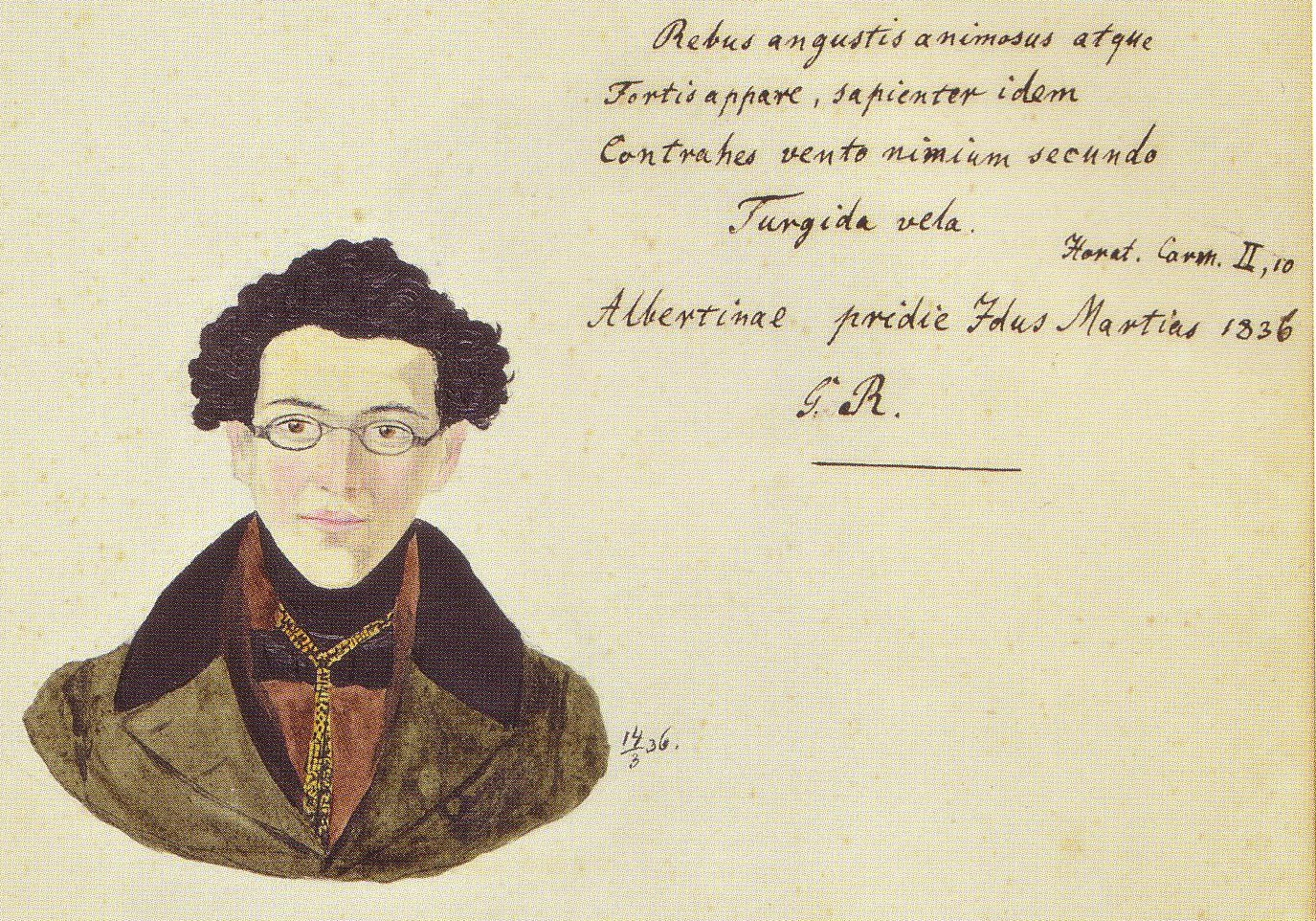 Porträtaquarell von George Rosenhain (1816-1887)